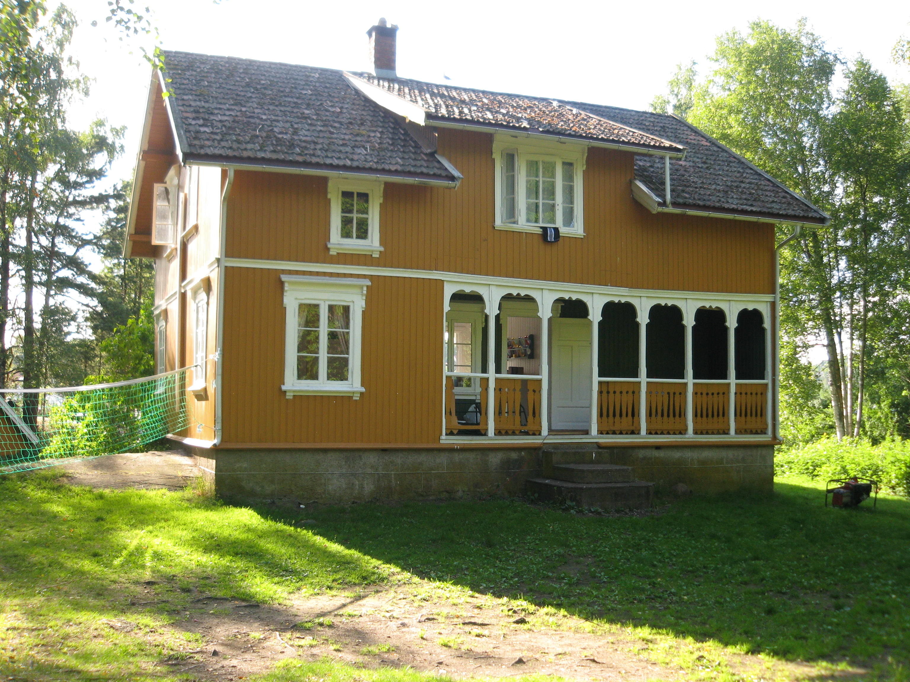 Baksiden av huset på Barneskjær